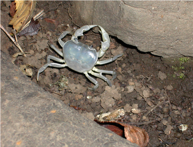 文京区の新江戸川公園で撮影したサワガニの写真